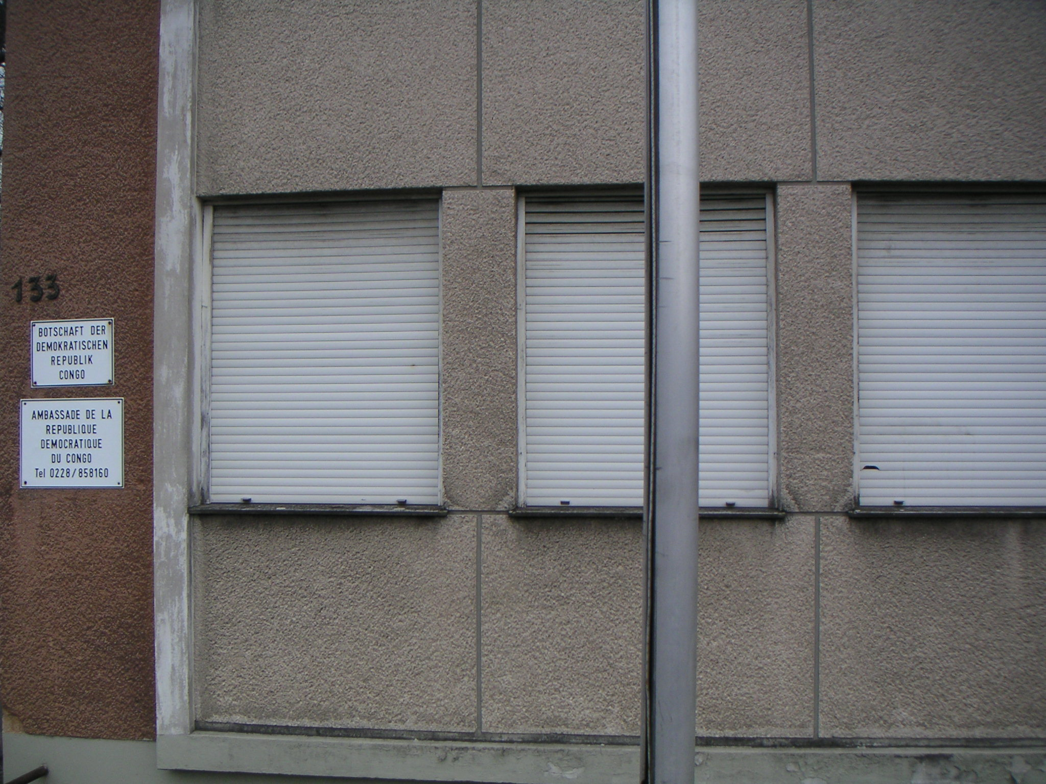 Ehemalige Botschaft der Demokratischen Republik Kongo in Bonn-Mehlem, Im Meisengarten 133, letzte Botschaft mit Hauptsitz in Bonn vor Umzug nach Berlin, heute ein Mehrparteien-Mietshaus